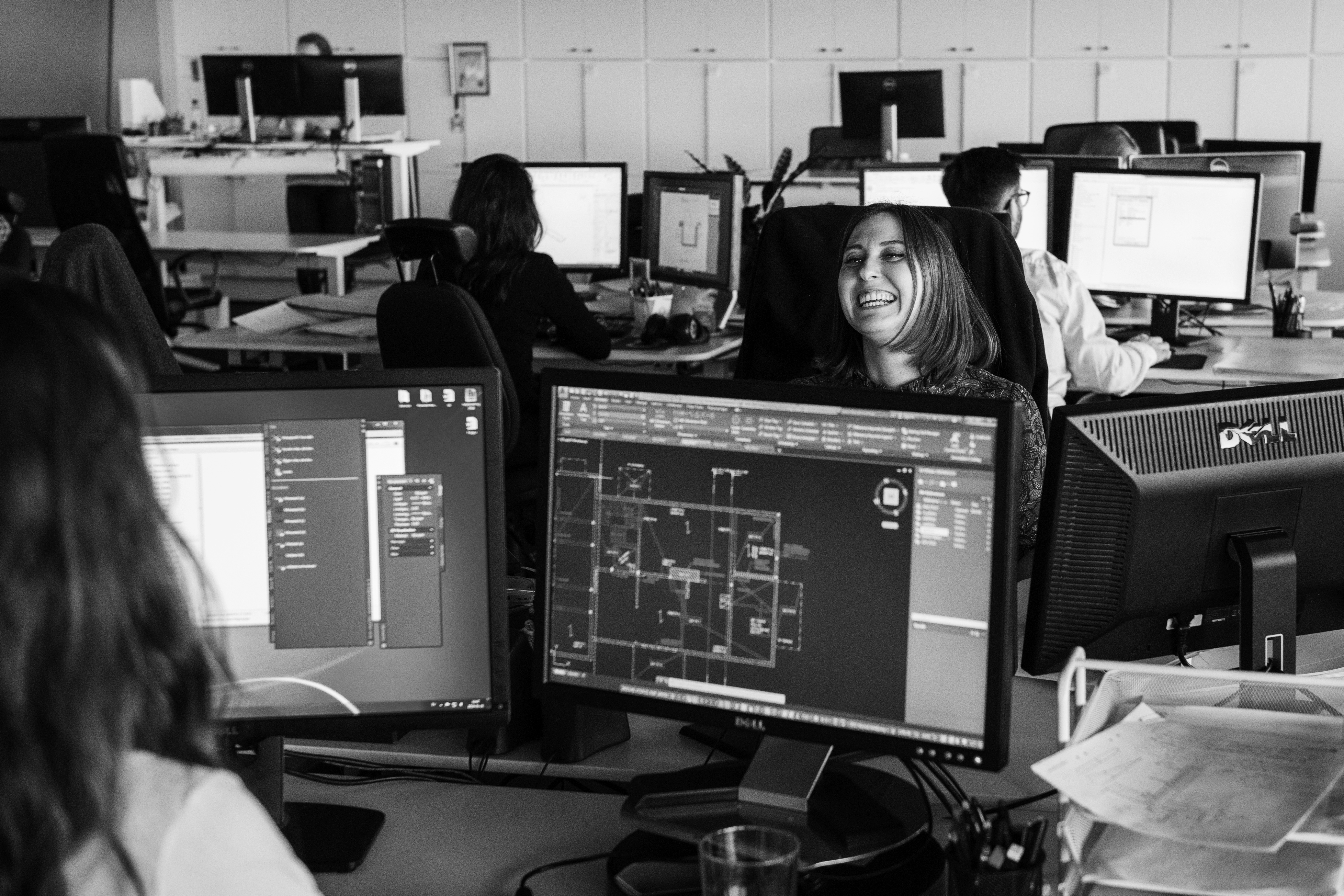 Medarbetare på Looströms kontor intill Slussen i Stockholm.